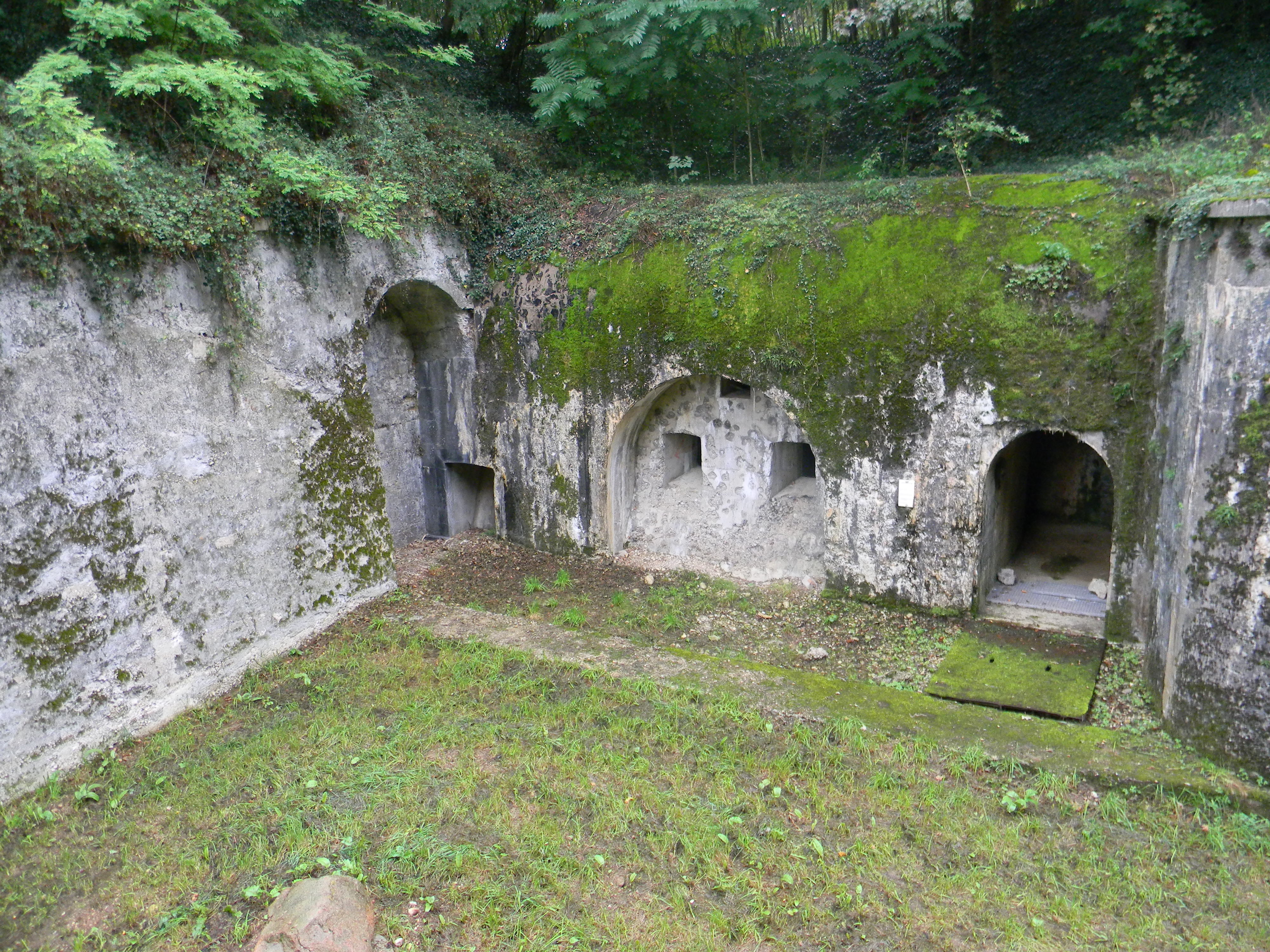 Coffre de contre-escarpe du Fort de Saint-Priest, près de Lyon. Ouvrage en béton armé de 6 canons courts ou revolvers pour défendre les fossés. Un pont-levis mécanique enjambe un bassin d'un mètre cinquante d'eau.